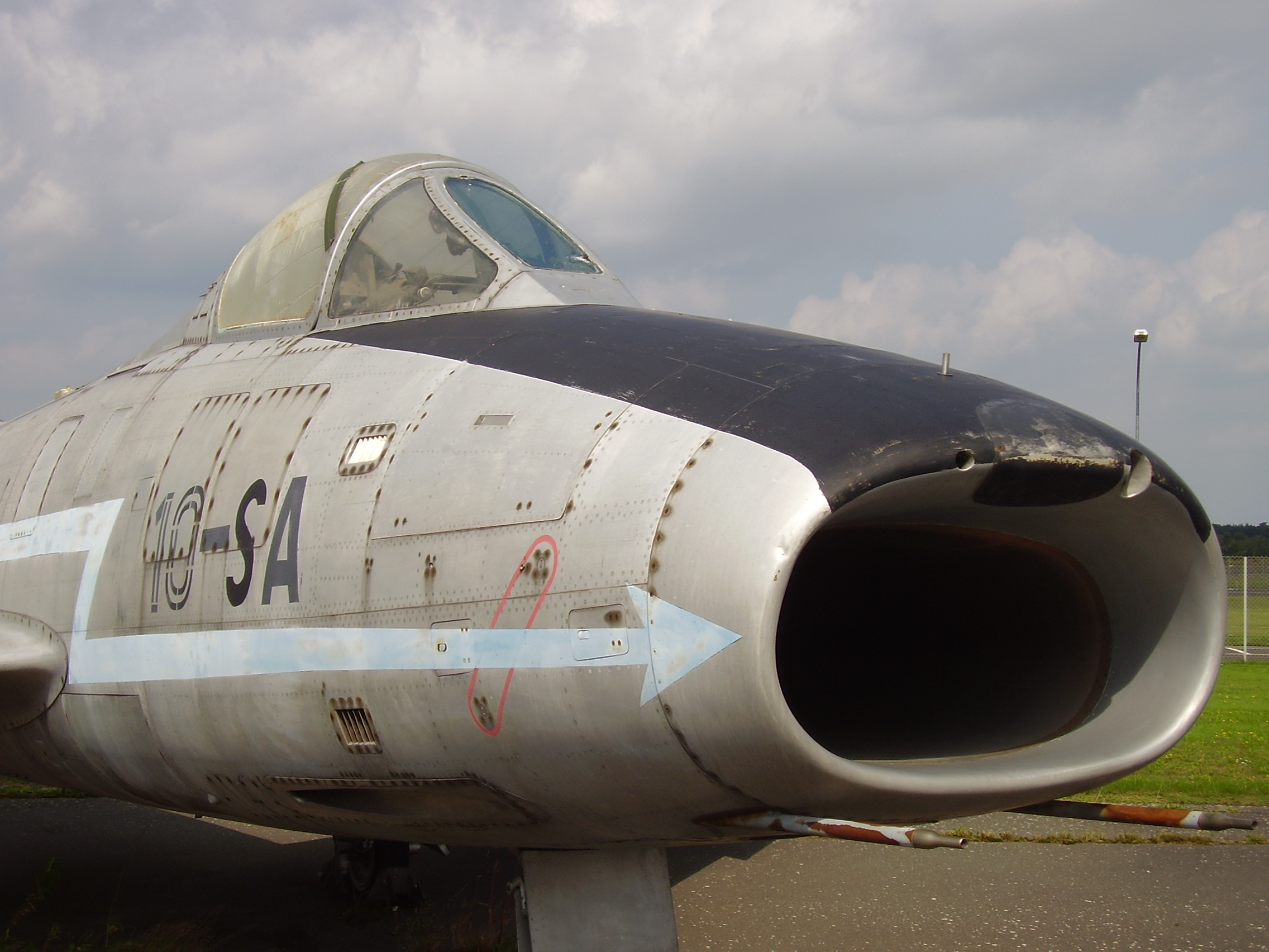 Luftwaffenmuseum der Bundeswehr; Airforce Museum of the Bundeswehr; Berlin-Gatow, Dassault Super Mystère B2